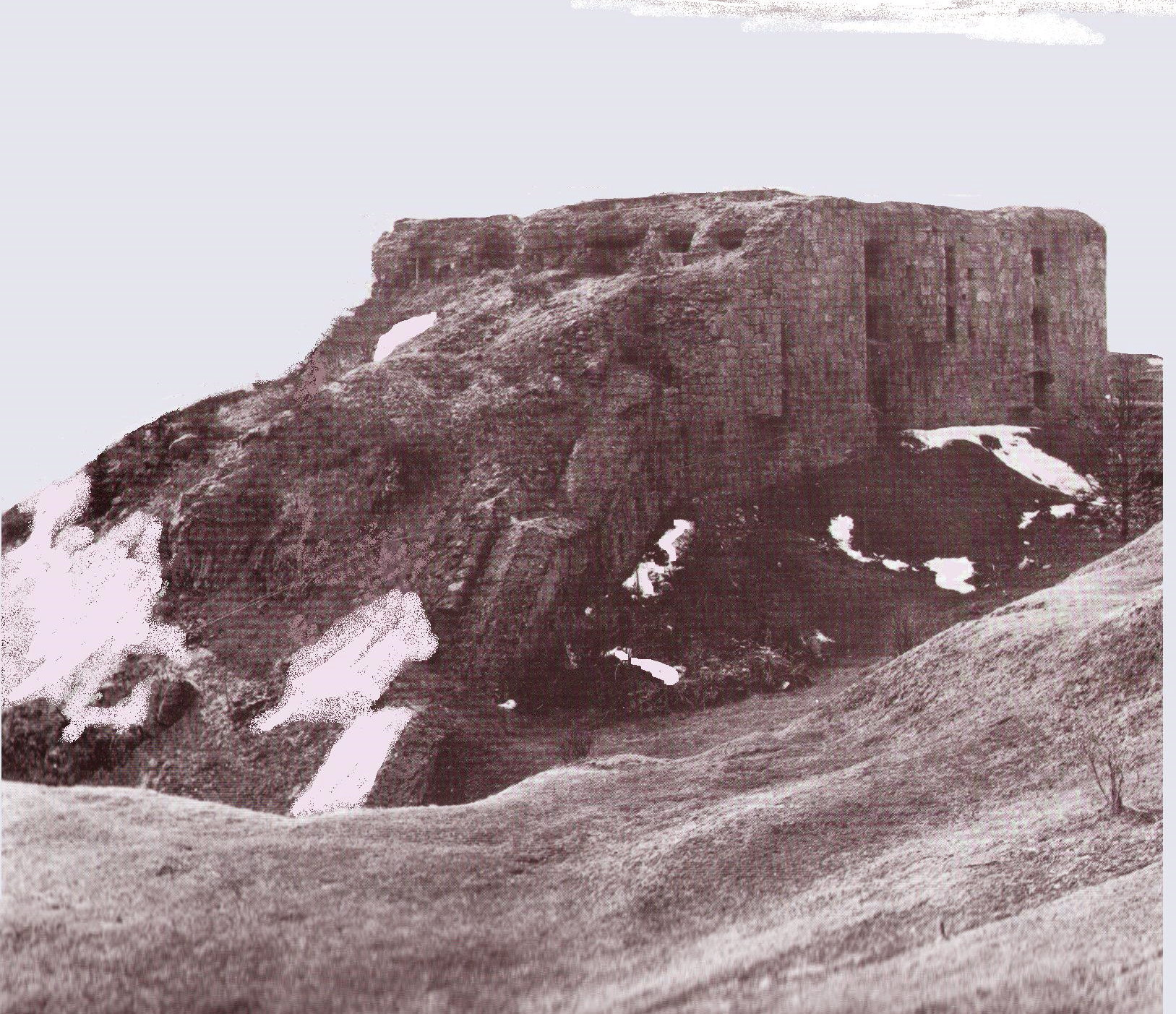 Fort La Corte (Werk La Corte)